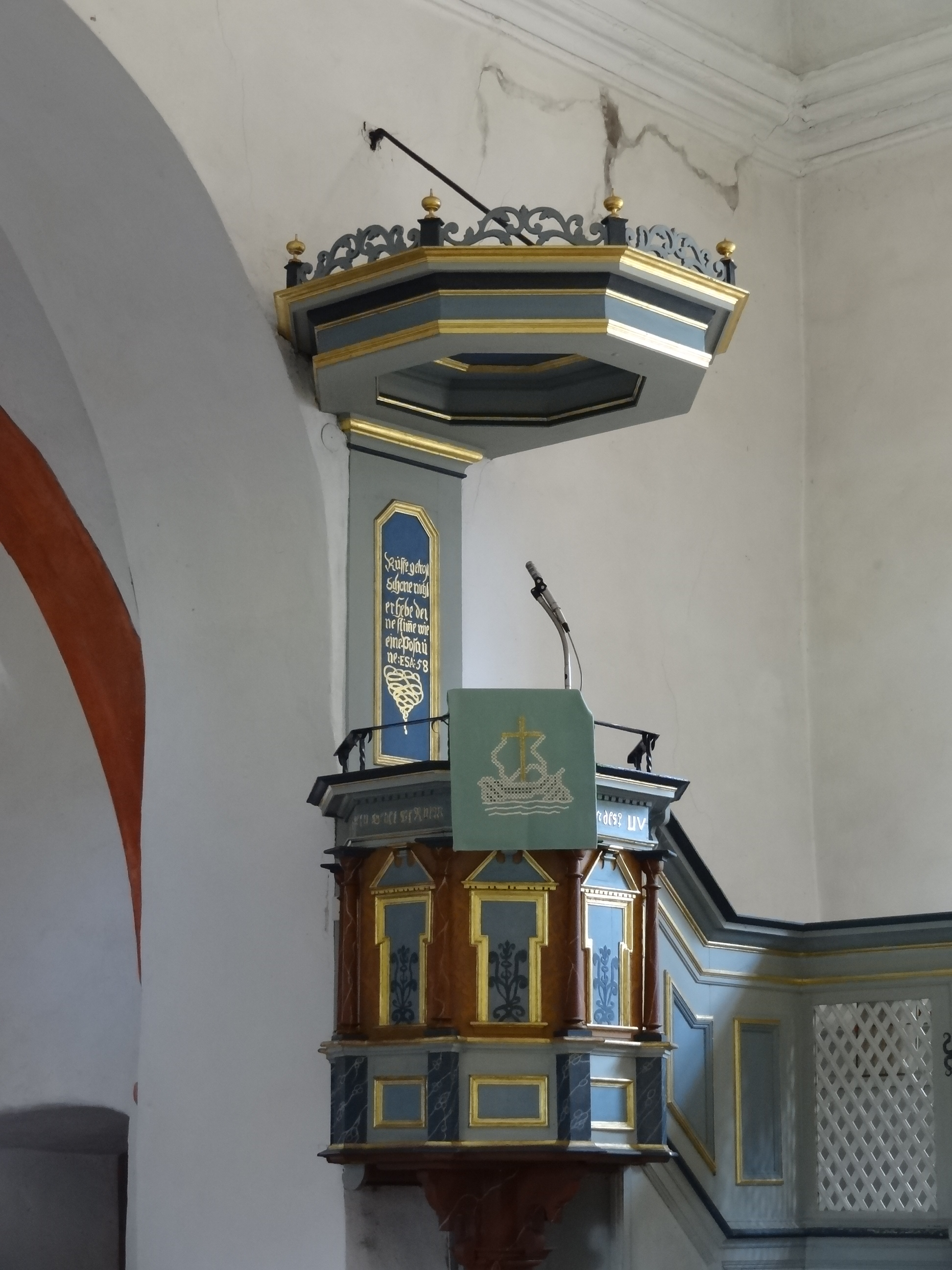 Evangelische Kirche Obbornhofen